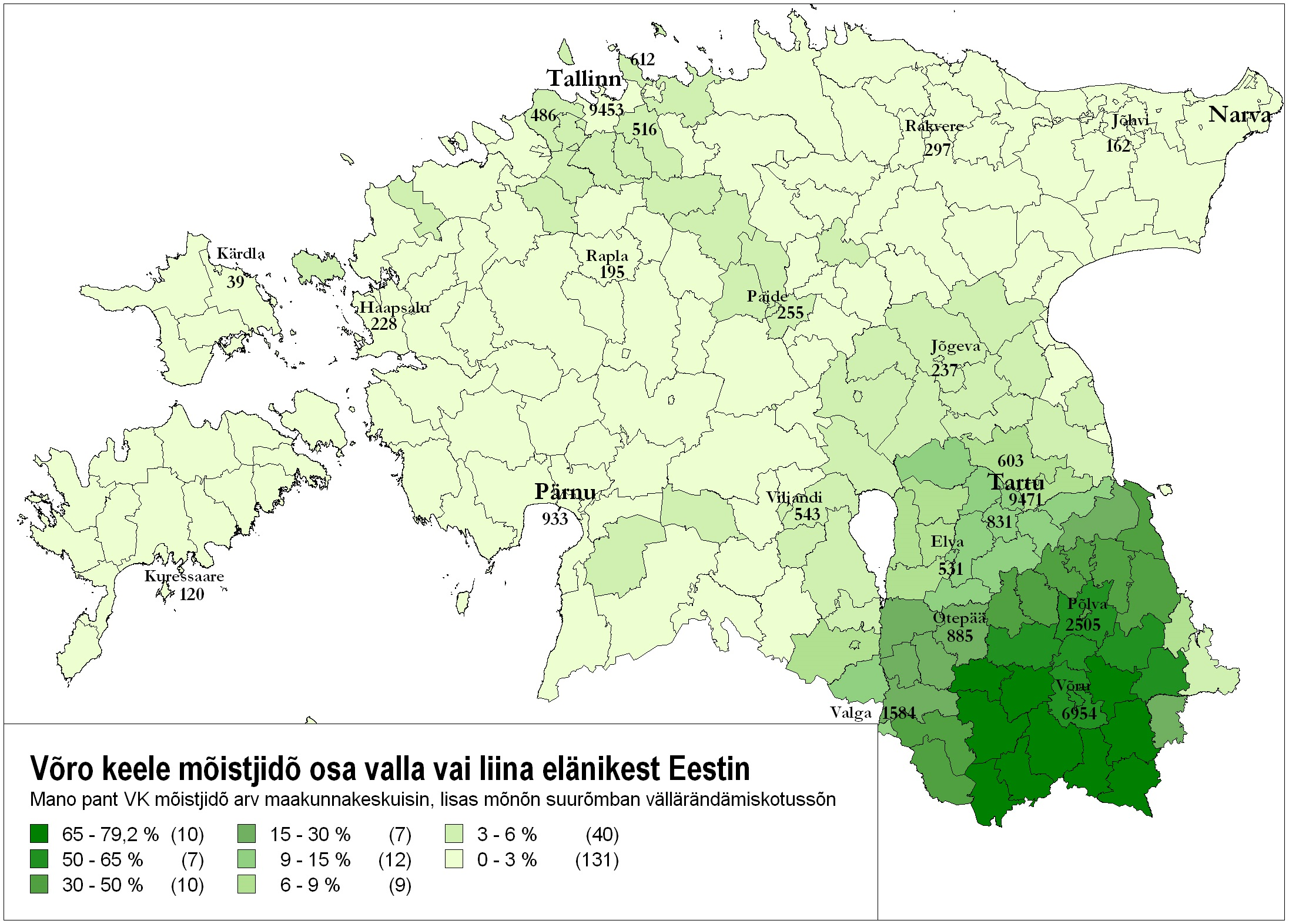 Võro: Võro keele mõistjidõ protsent Eesti umavalitsuisin ja arv suurõmbin elopaigon 2011. aastaga rahvalugõmisõ perrä.